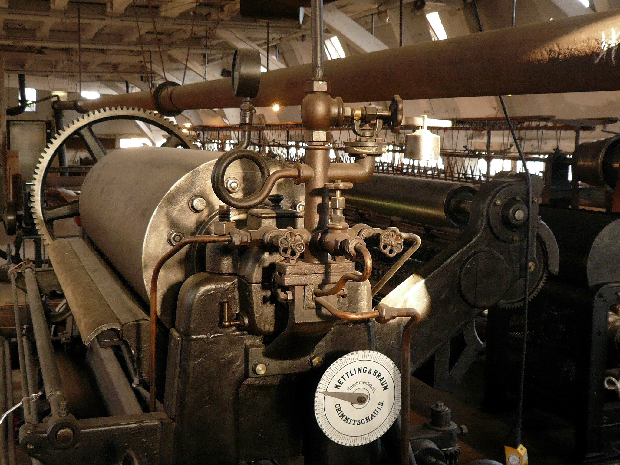 Tuchpresse aus der Tuchfabrik Müller, hergestellt von der Fa. Kettling und Braun in Crimmitschau